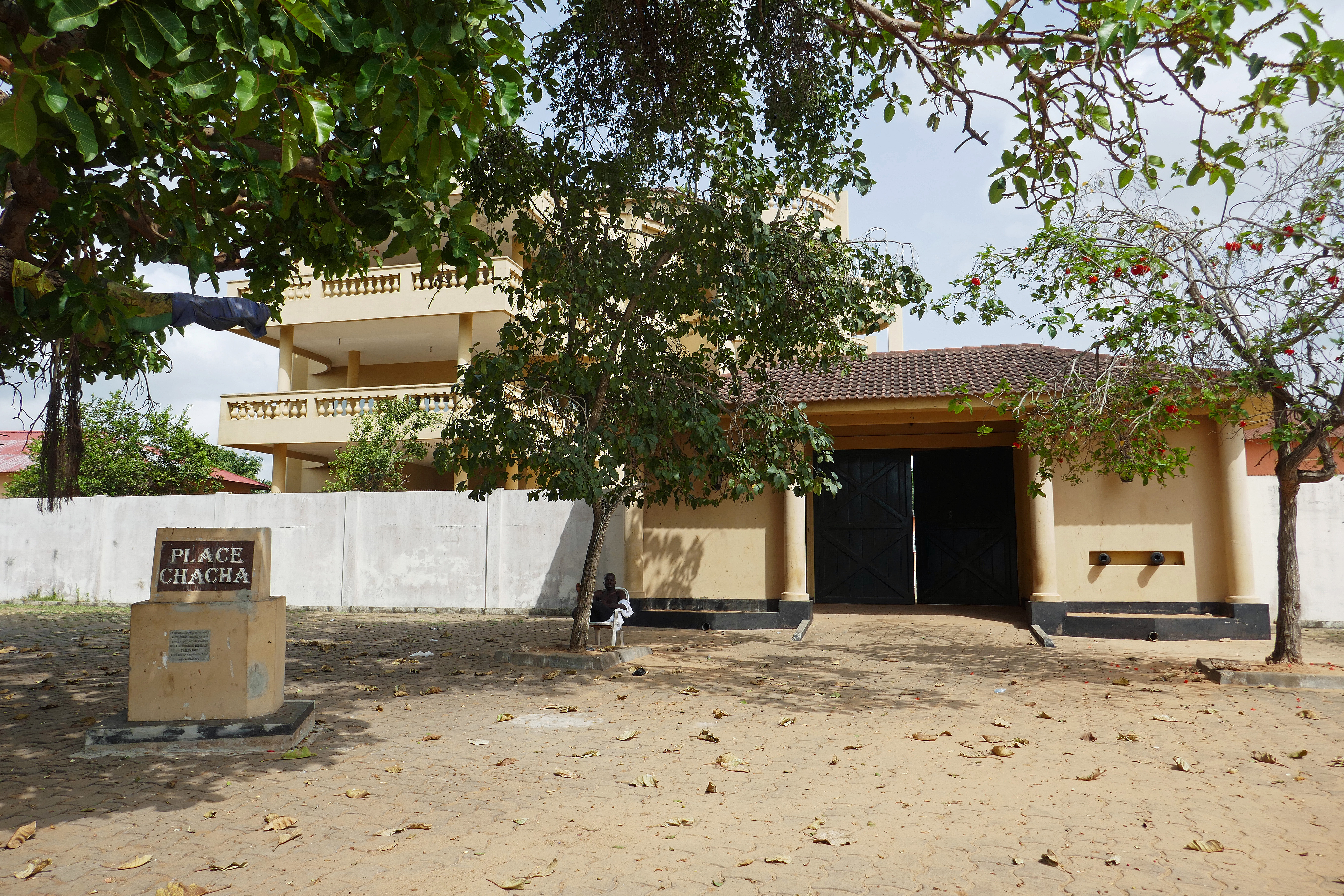 Ouidah (Bénin) : la place Chacha, ou place des Enchères. Les esclaves y étaient/auraient été vendus lors d'enchères publiques. La place a été réhabilitée en 1999.